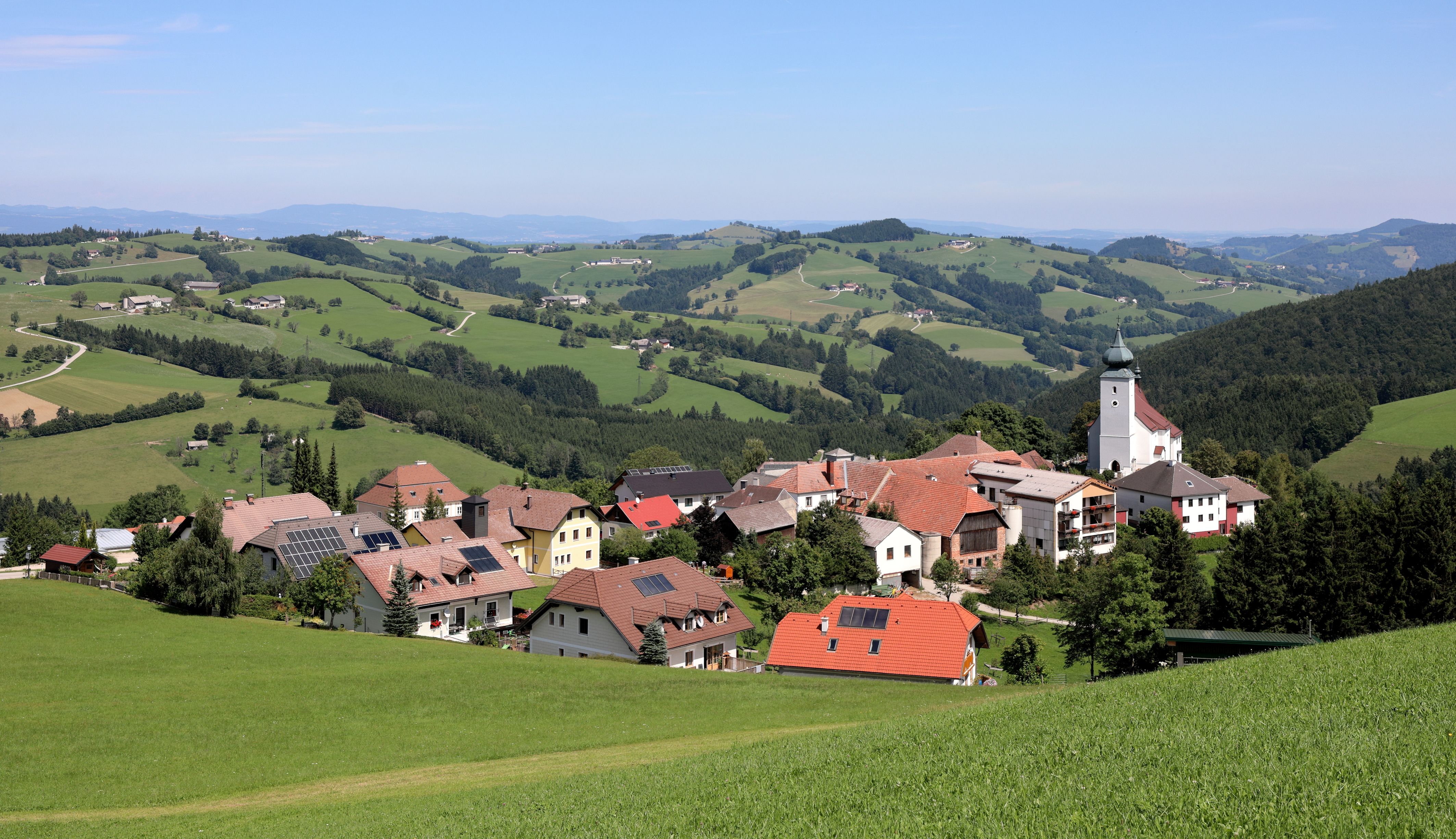 Südwestansicht des Dorfes St. Leonhard am Wald. Ursprünglich eine eigenständige Gemeinde wurde sie 1972 in die niederösterreichische Stadtgemeinde Waidhofen an der Ybbs eingemeindet.